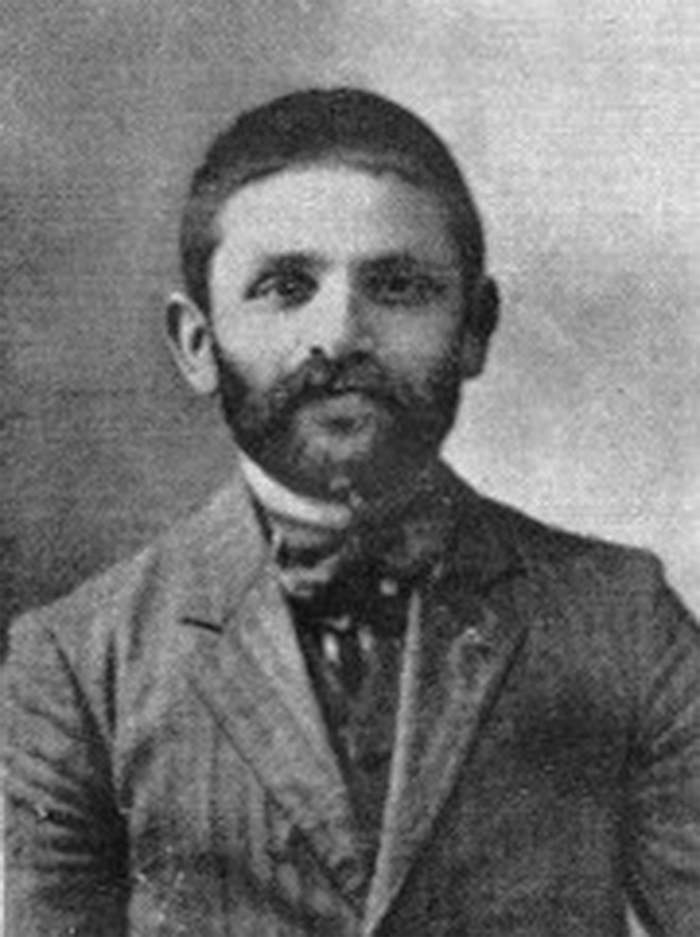 משה עזריאל